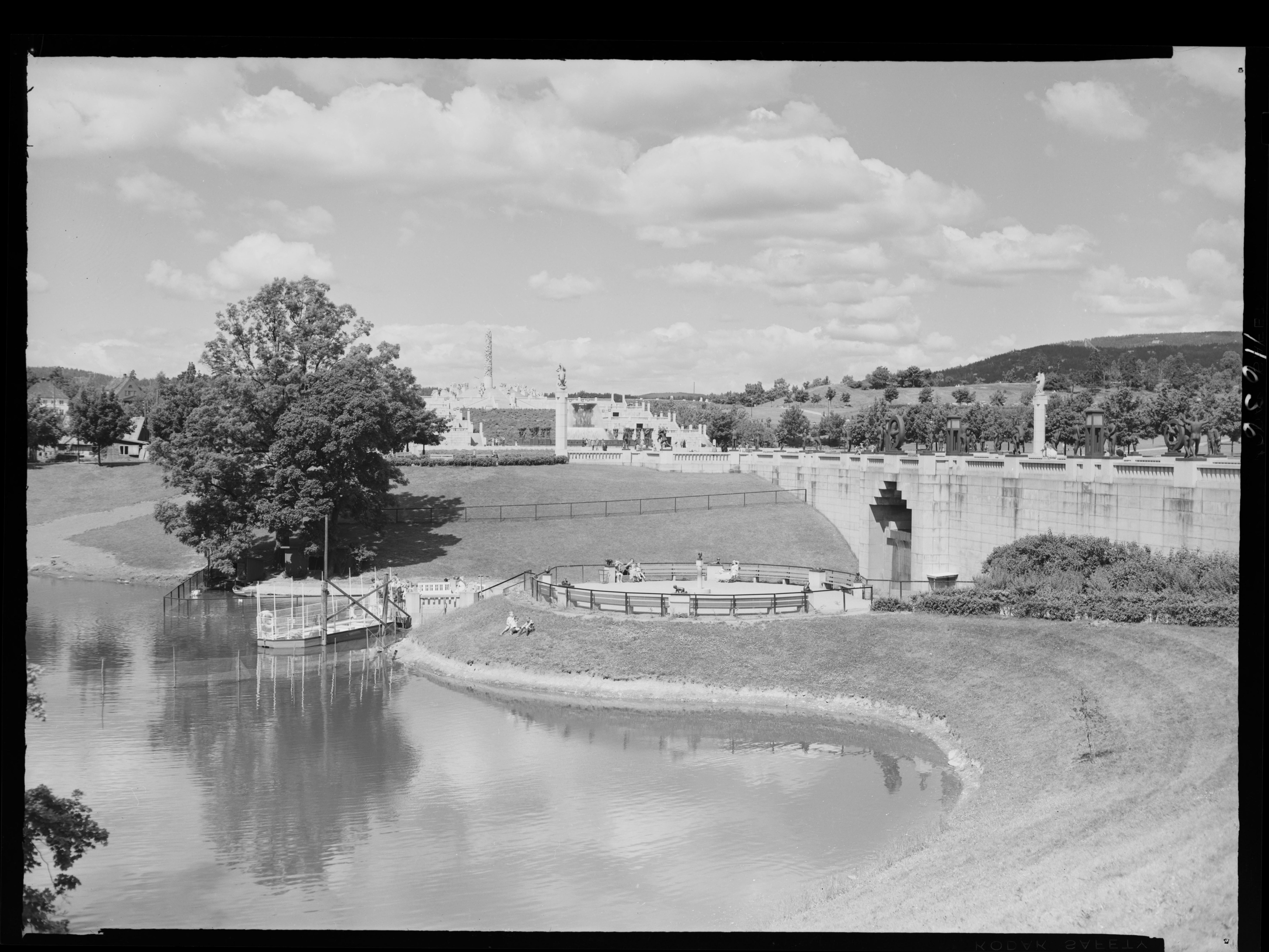 Bildet er hentet fra Nasjonalbibliotekets bildesamling. Anmerkninger til bildet var: Fotograf ukjent Frognerparken,Oslo,Vigelandsparken, Oslo, Oslo